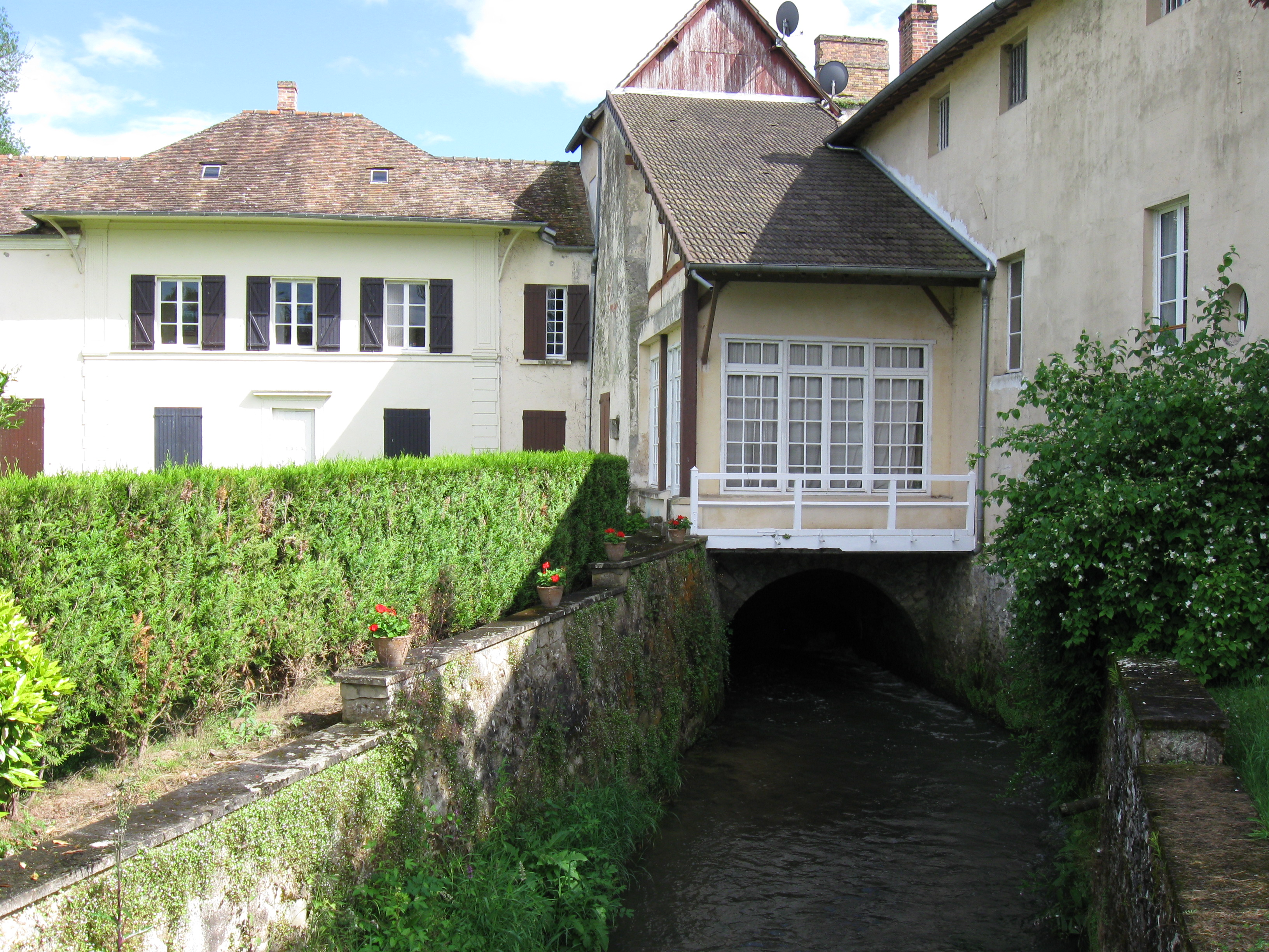 Moulin de Vasset sur la rivière le Clignon. (commune de Coulombs-en-Valois, département de la Seine-et-Marne, région Île-de-France).